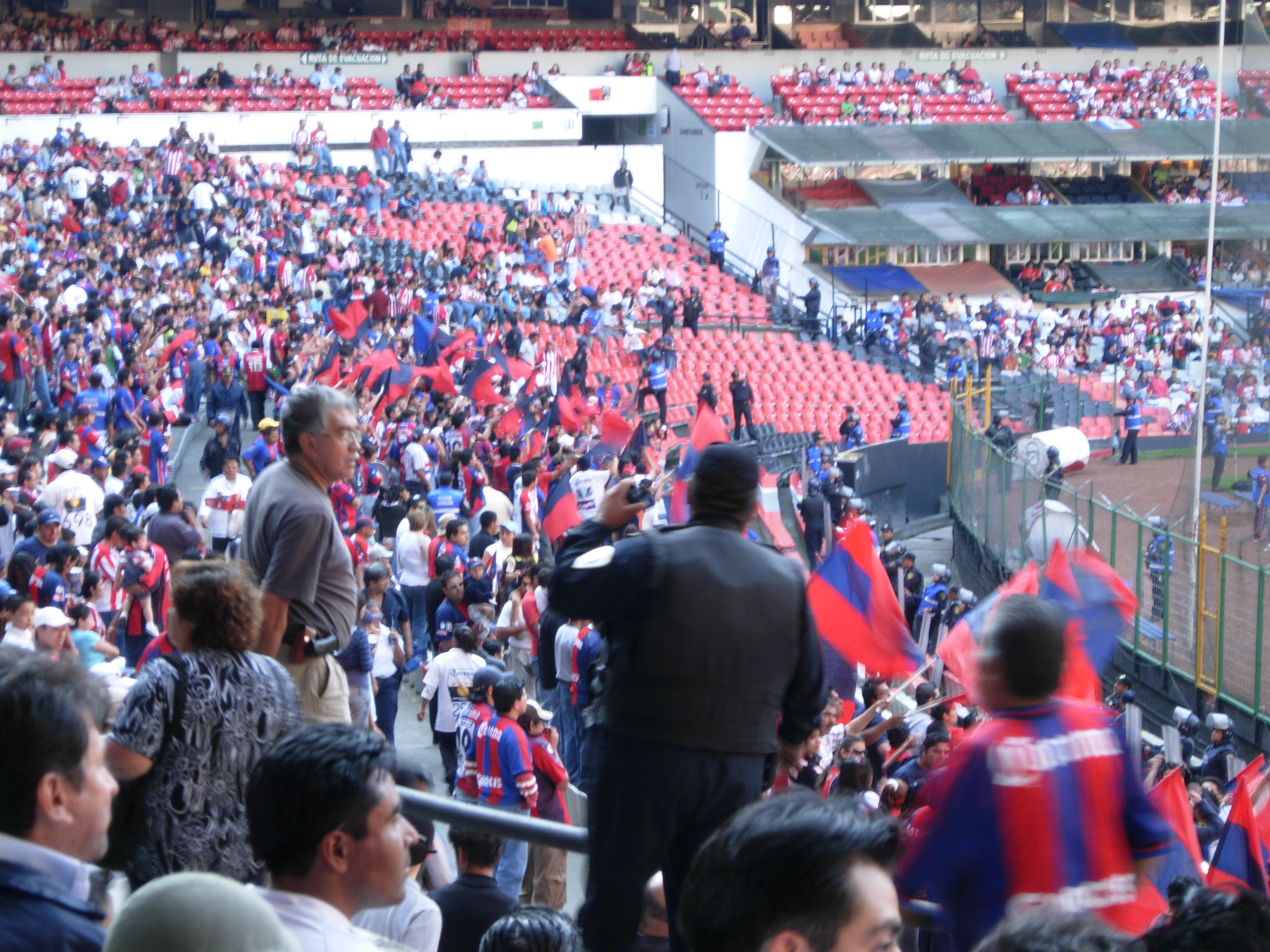 Atlantistas, en un partido Chivas-Atlante del Clausura 2007 del fútbol mexicano, disputado en el Estadio Azteca